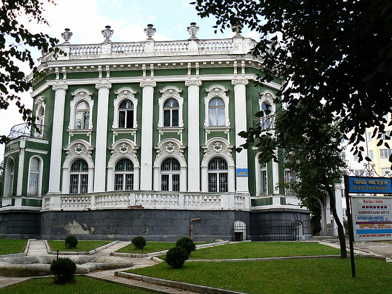 Палац мистецтв у Дрогобичі, серпень 2008 року